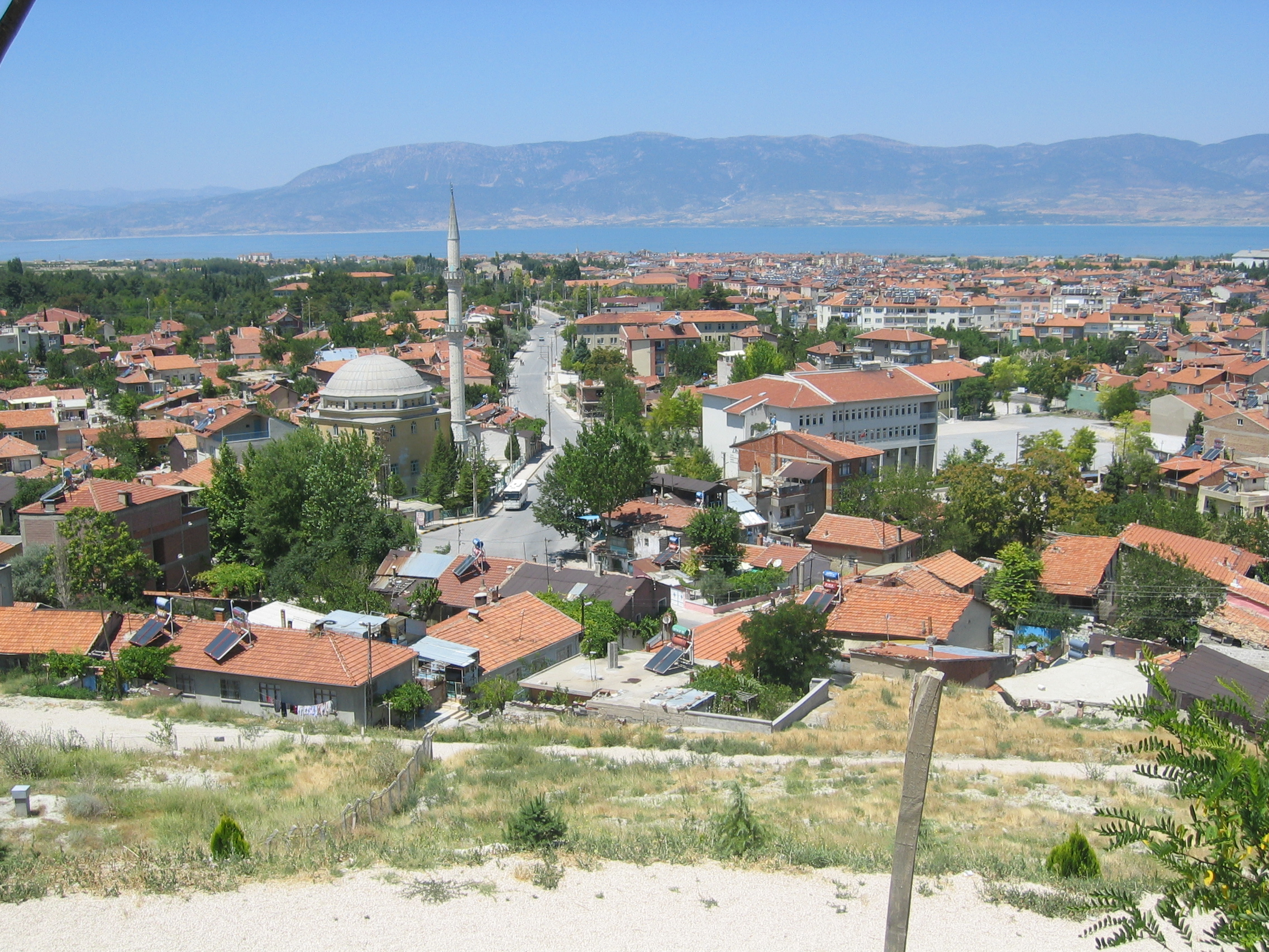 Burdur manzara